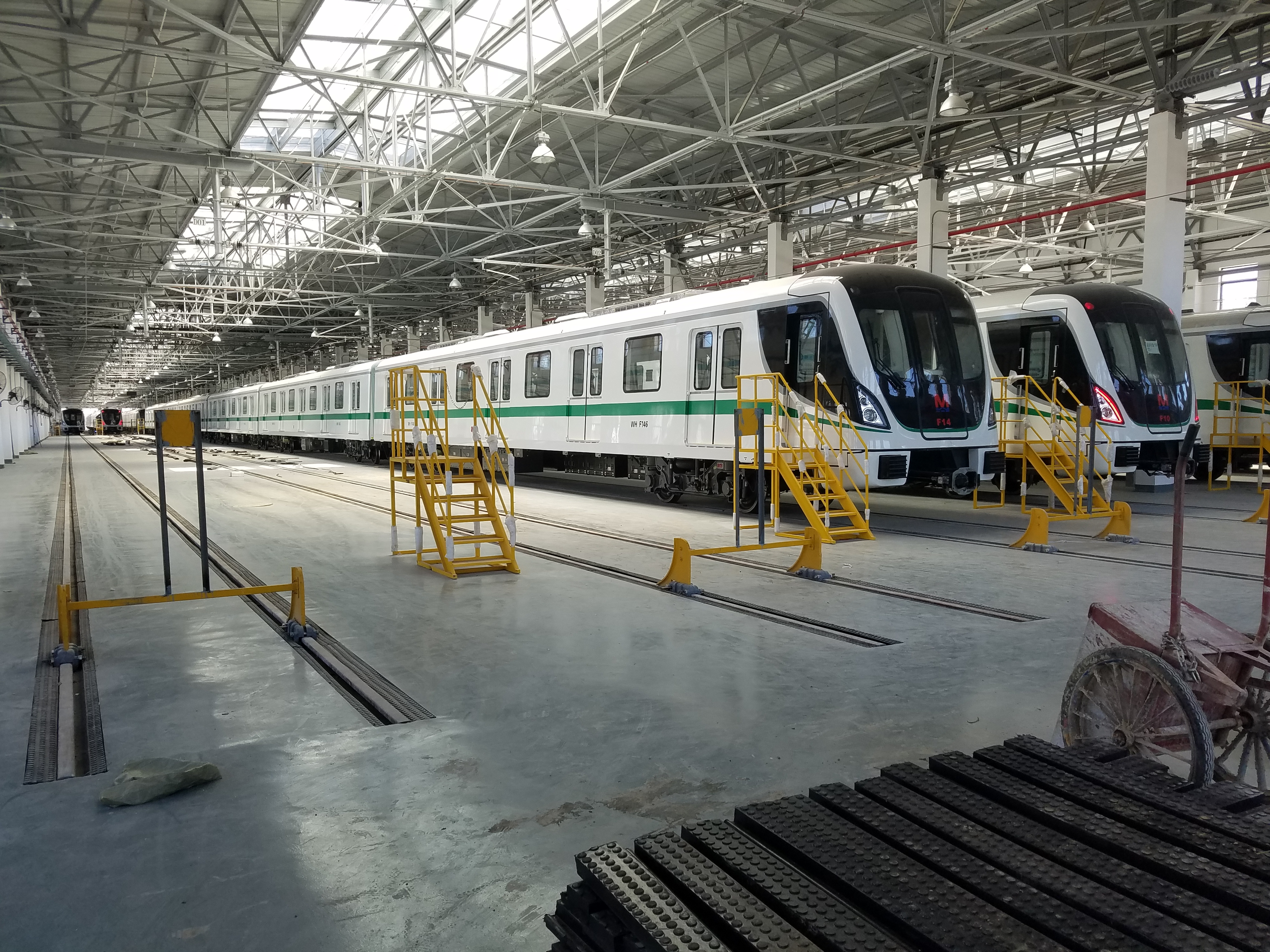 武汉地铁6号线列车